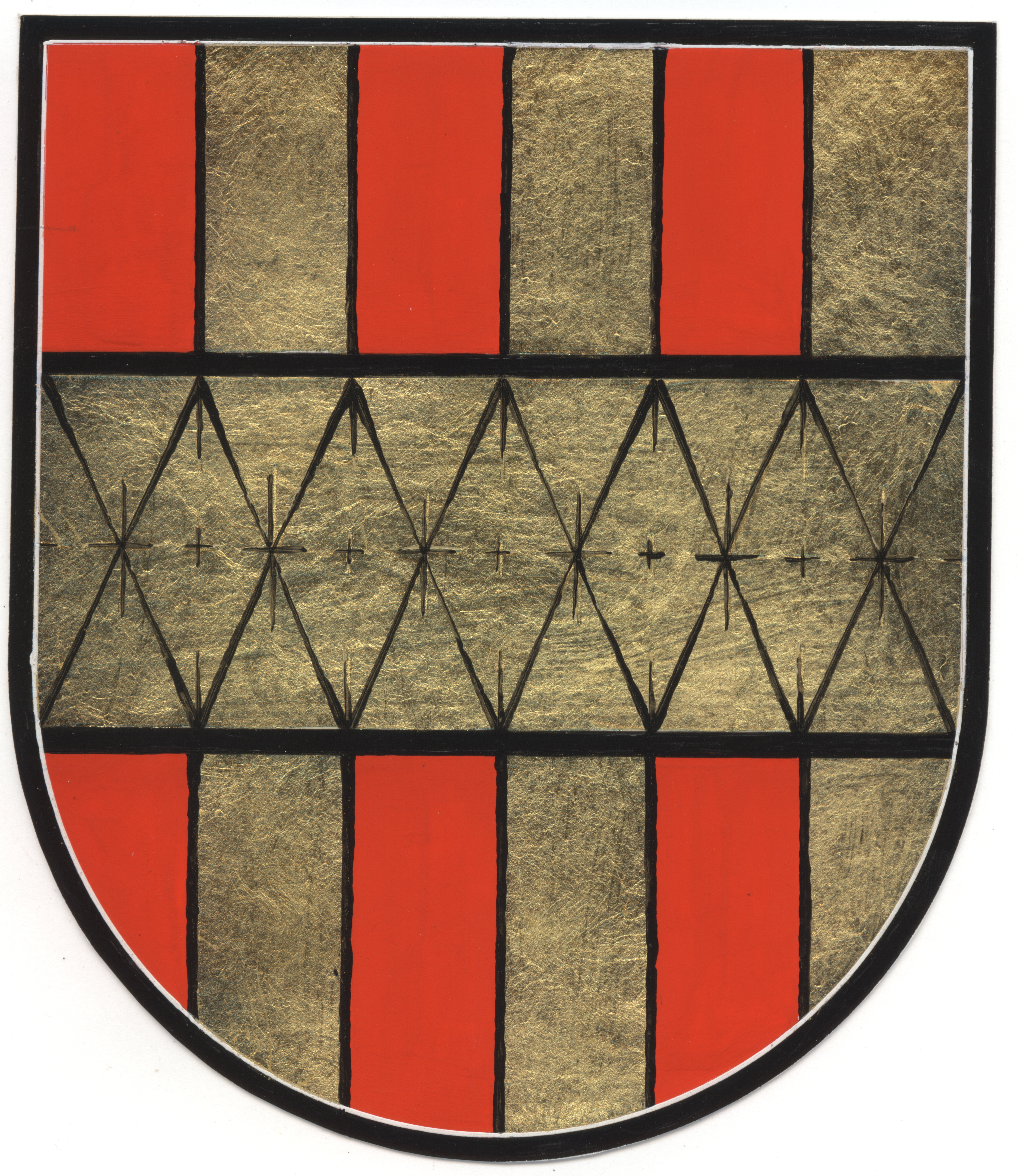 Wappen der Gemeinde Thannhausen